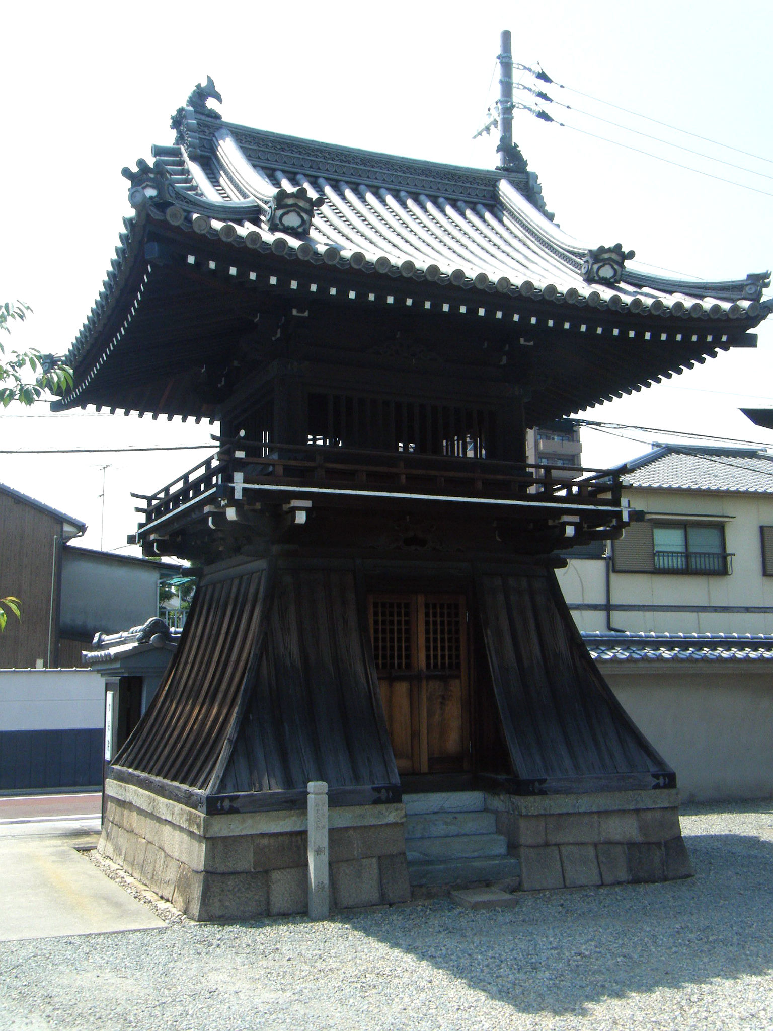 如来院応永32年梵鐘 兵庫県尼崎市